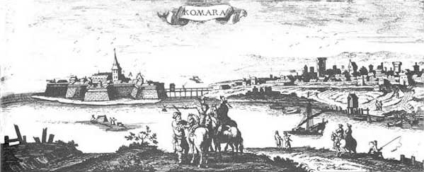 Komarno sa severa i Dunav sa šajkama, XVI vek